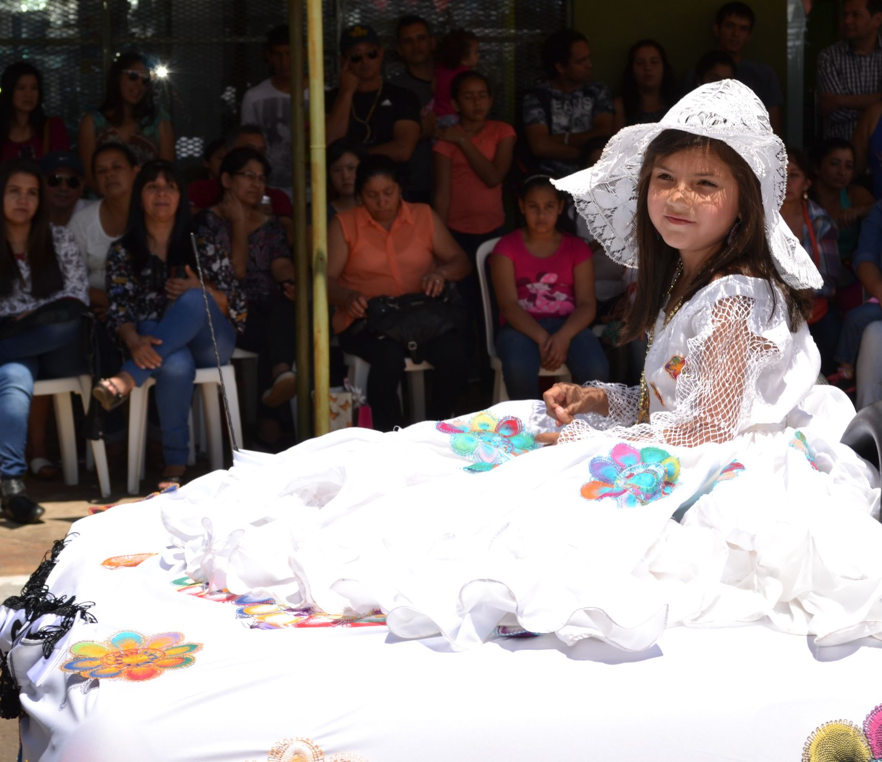 Niña participante del desfile de Carrozas del Ñandutí en la ciudad de Itauguá, Paraguay. Octubre de 2016.